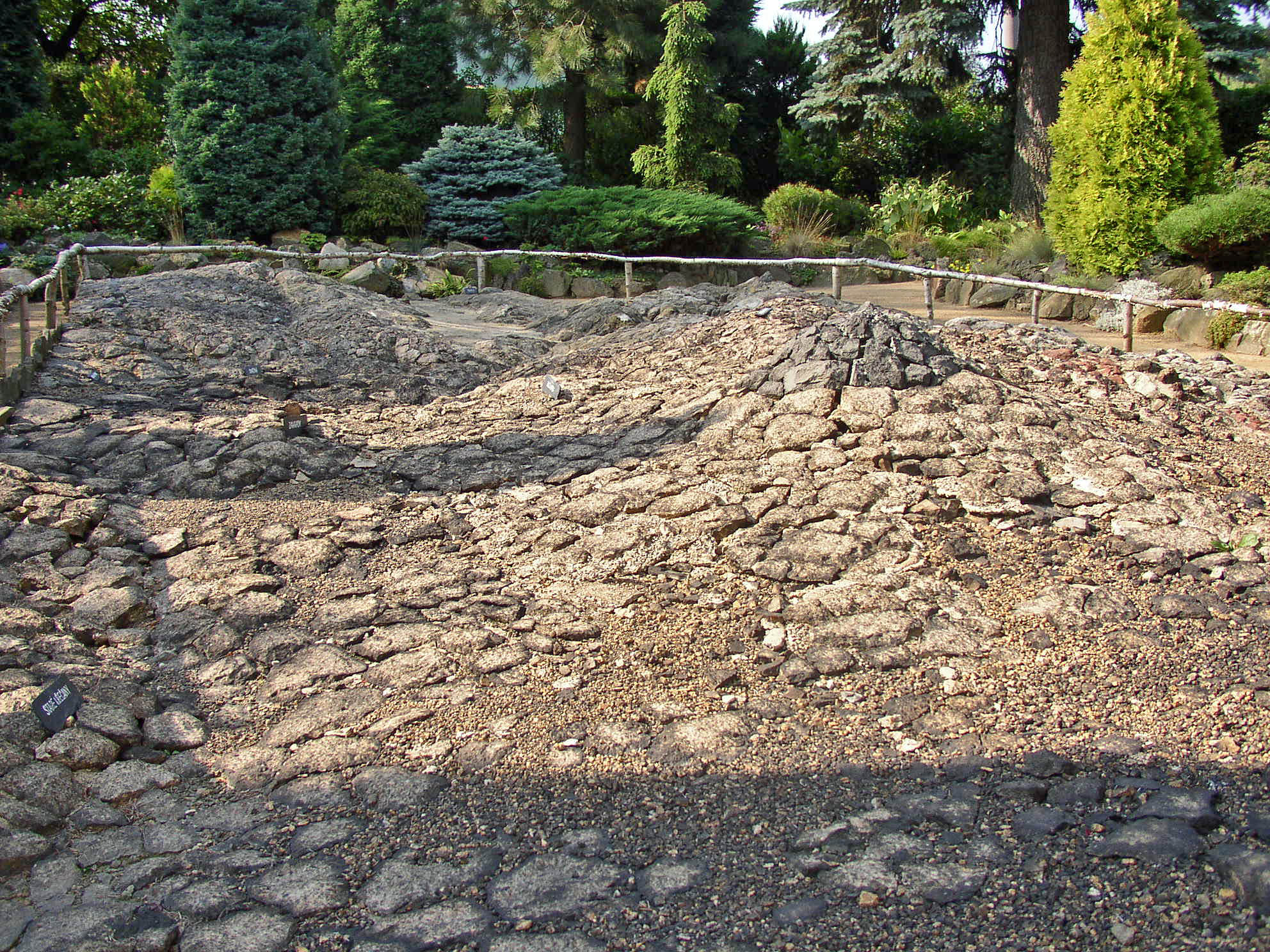 Plastická geologická mapa, v zahradě čp. 30, Krásná Lípa-Zahrady.